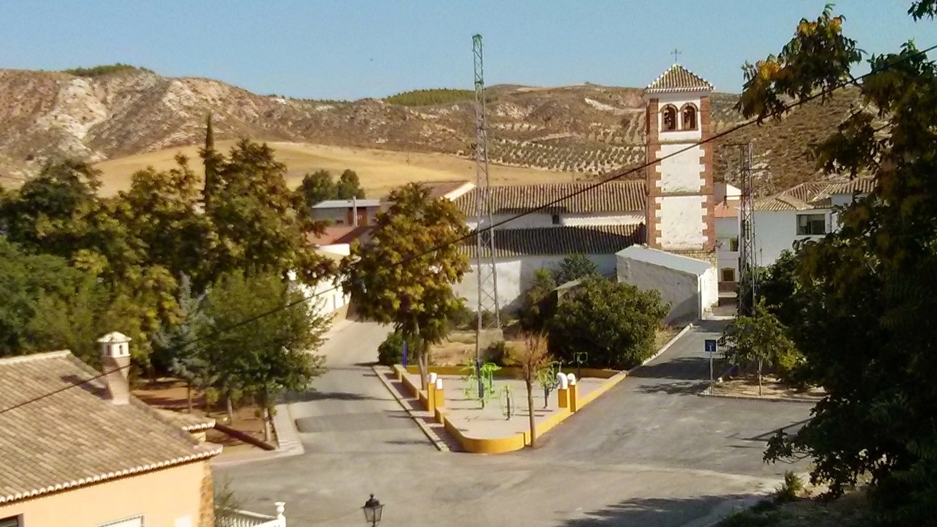 Calles de Alamedilla, provincia de Granada (España)